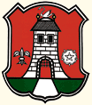 znak obce Plánice